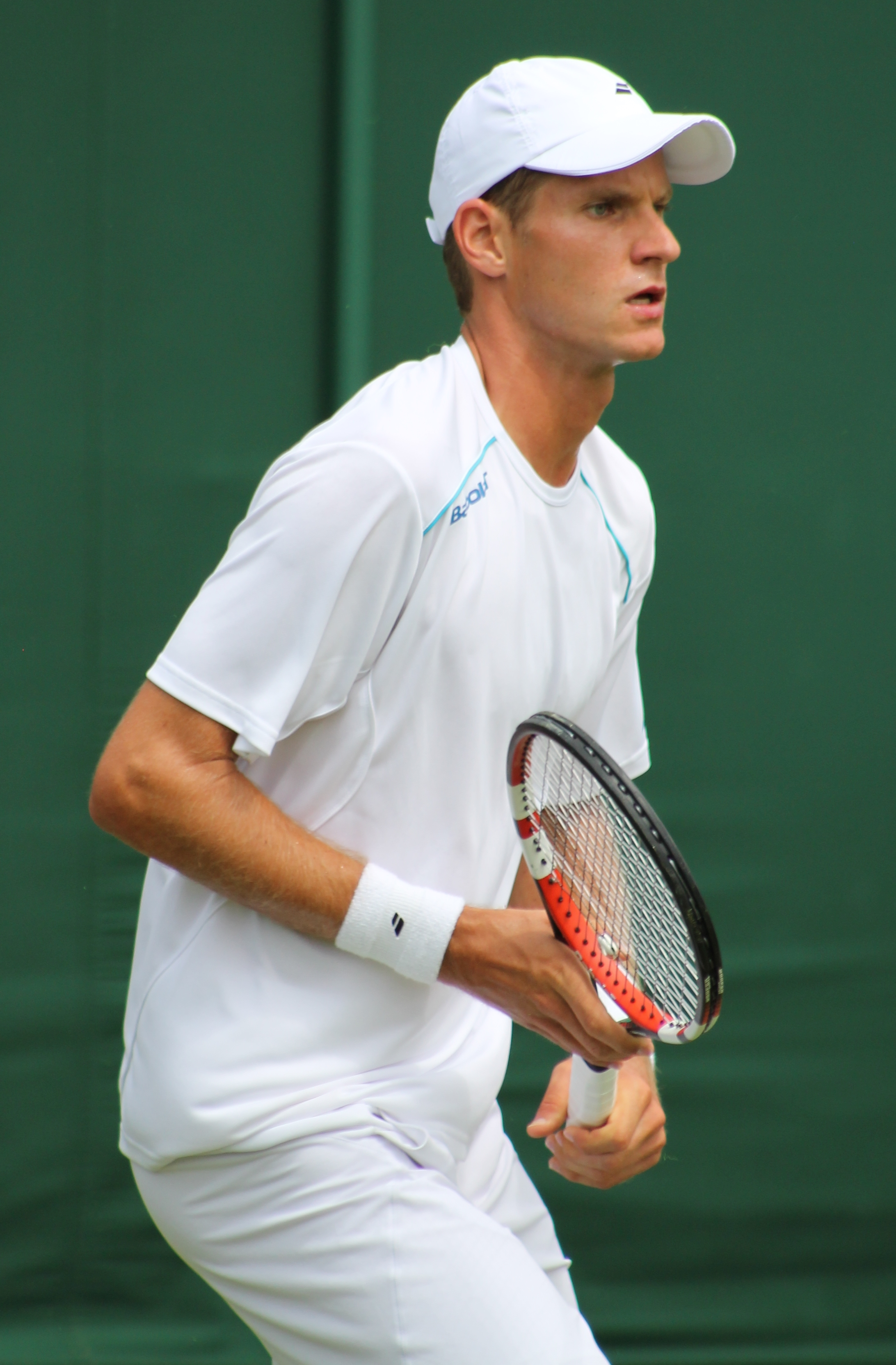 Rola WM14 (21)